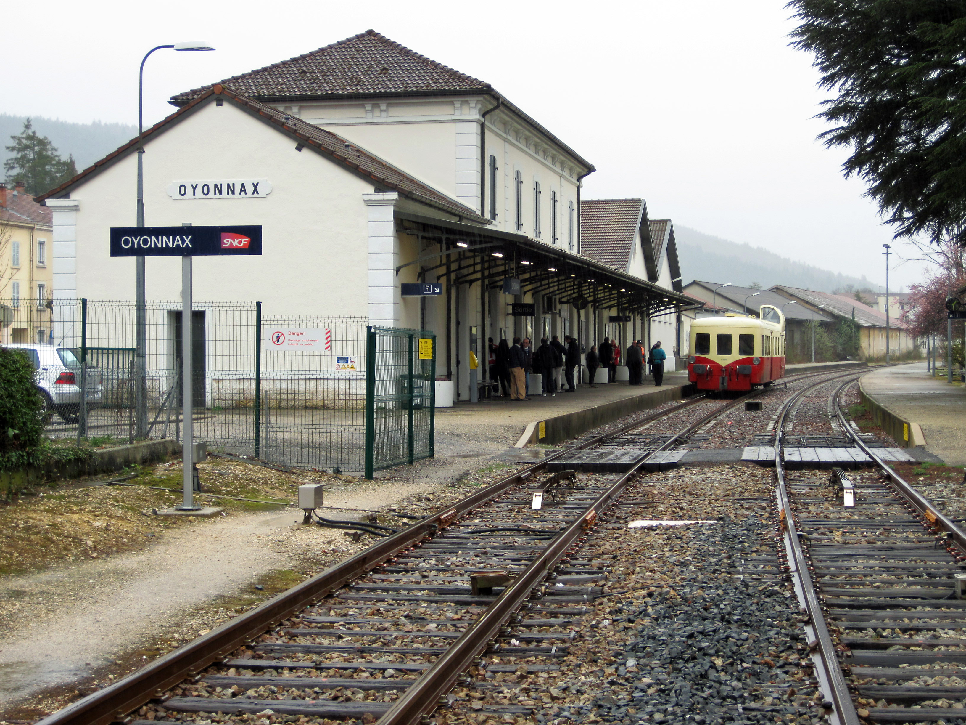 Autorail touristique X4039 à l'arrêt en gare d'Oyonnax, mars 2014.